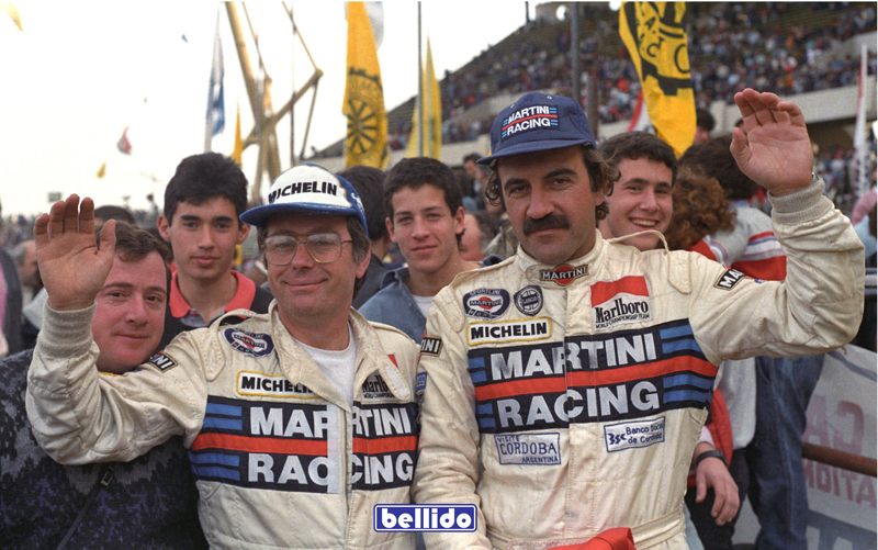 Jorge Del Buono (izq.) y Jorge Recalde (der.) luego de ganar el Rally de Argentina de 1988.